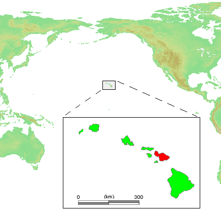 Hawaii Islands - Maui.PNG